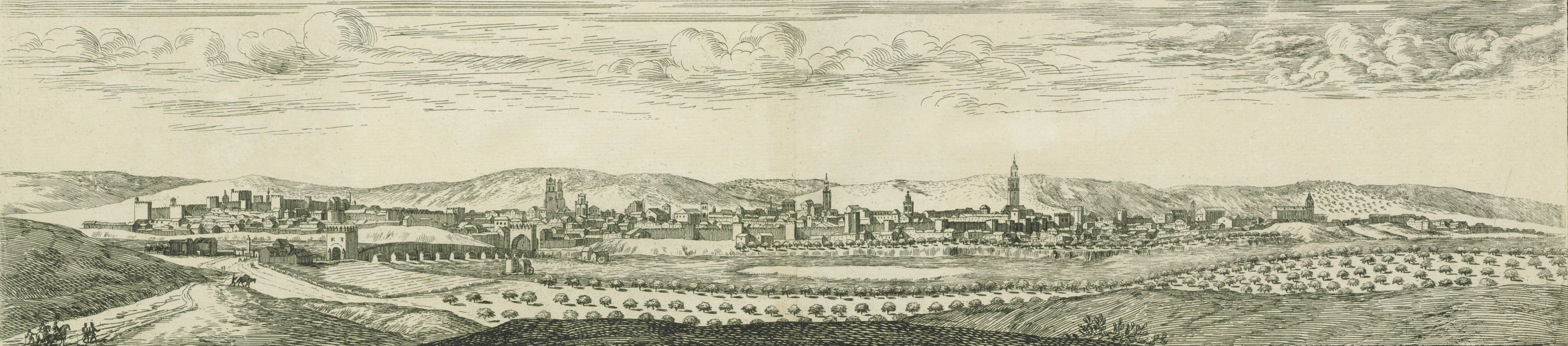 Profil de la ville d'Écija en Espagne.